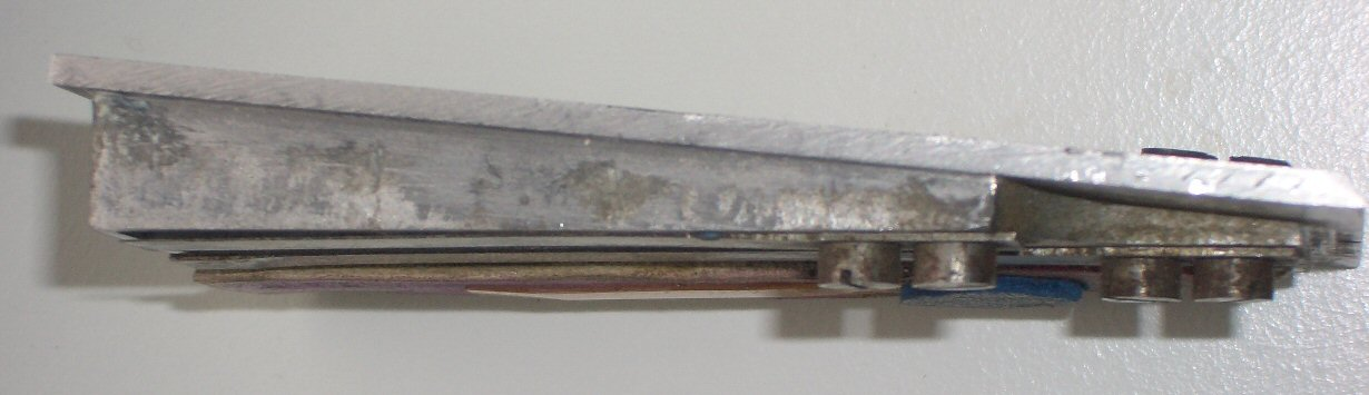 Alte Helikonstimmplatte von der Seite gesehen Möglichkeiten zur Lizenzierung, bitte die nicht-benötigte Variante aus dem Code löschen